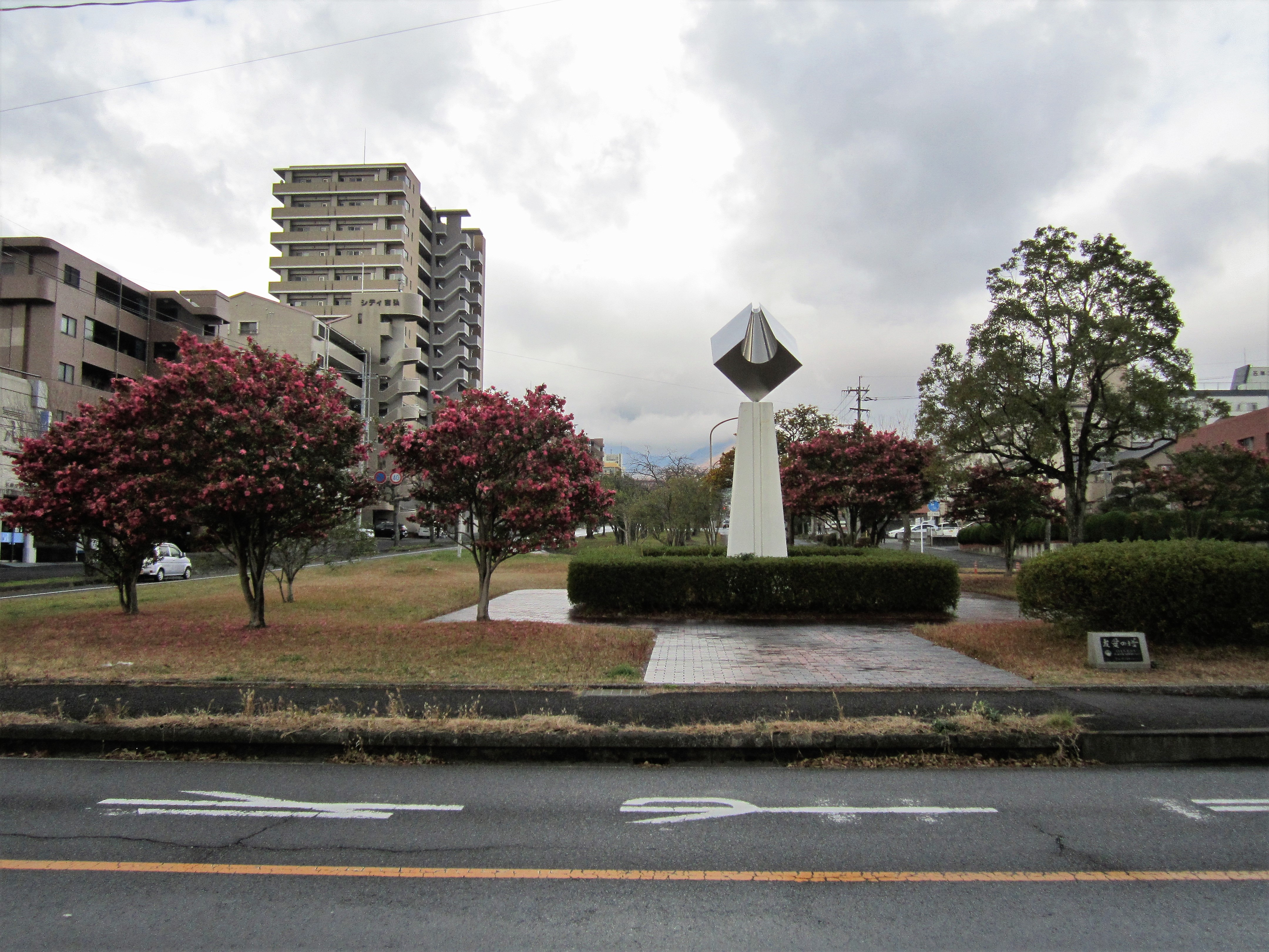 新別府駅予定地（山手側の中央分離帯がある道路） Canon PowerShot A2200